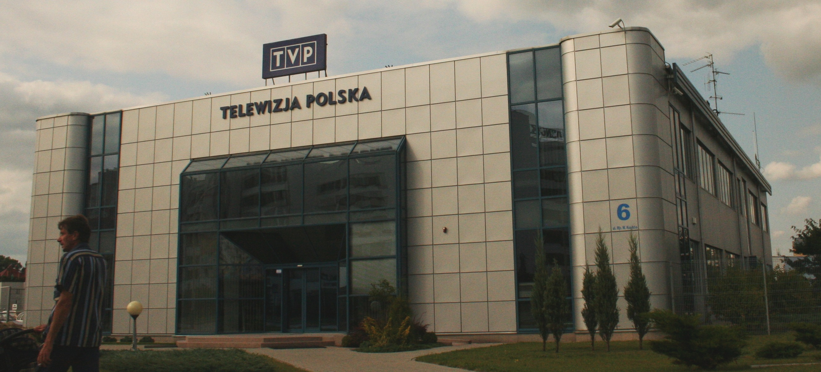 Budynek oddziału TVP w Rzeszowie